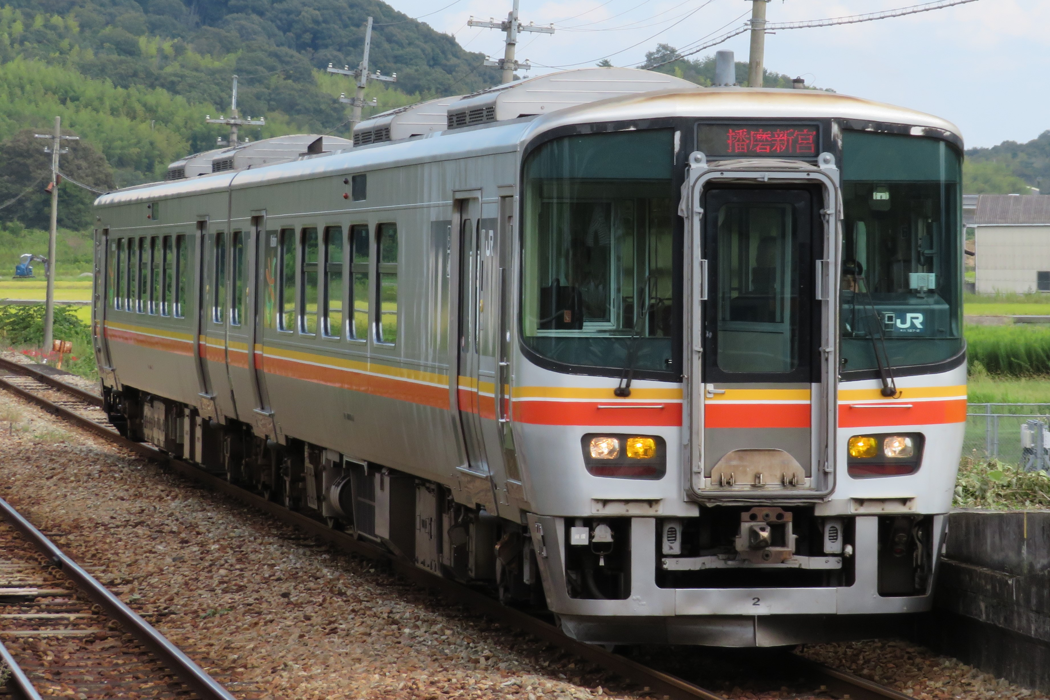 JR西日本キハ127-2（太市駅にて）